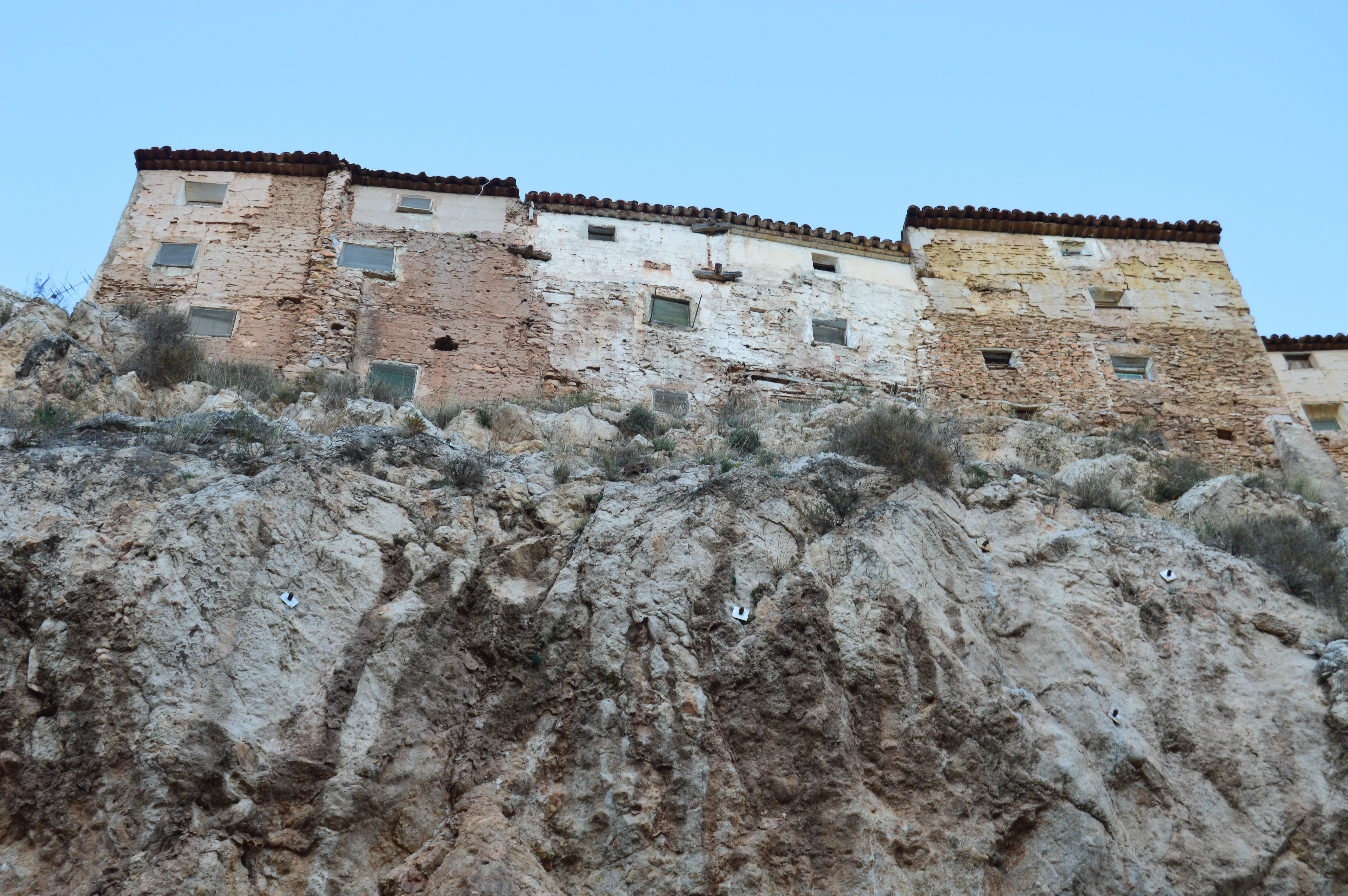 Casas Colgantes de Nigüella, Zaragoza